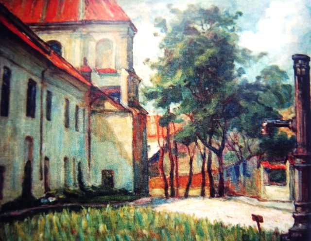 Моисей Лейбовский. Фрагмент костёла францисканцев в Вильно. Нач. ХХ в.